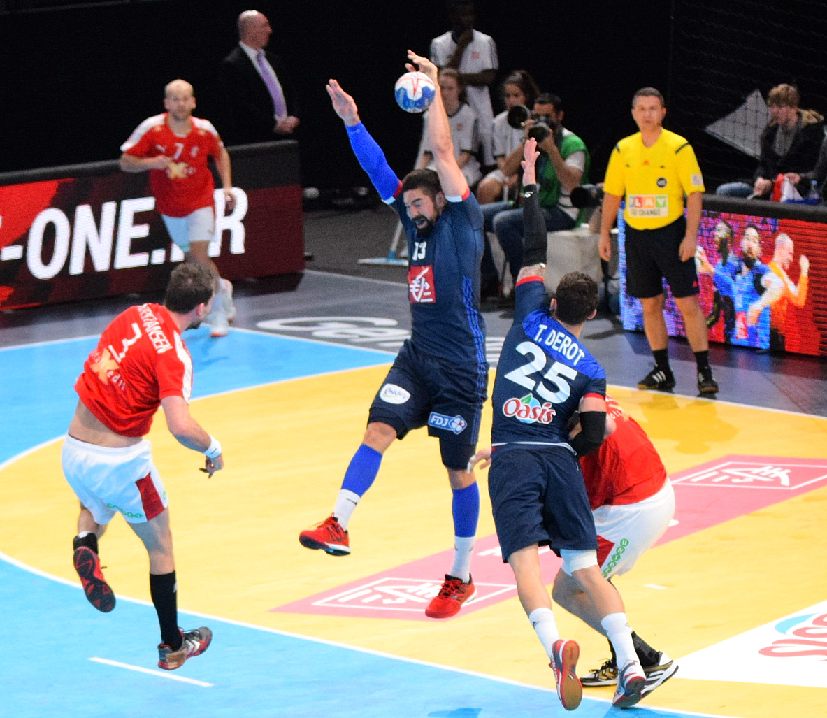 Le 10 janvier 2016 lors du match France / Danemark durant la Golden League à l'AccorHotels Arena (Paris).